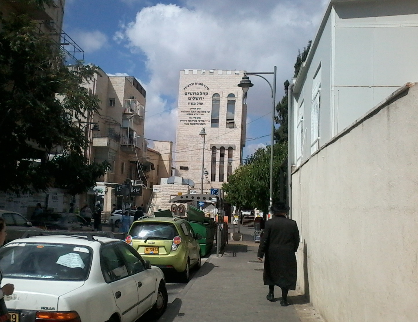 בית המדרש המרכזי של קהל פרושים ברחוב צפניה בשכונת כרם אברהם בירושלים (מתחתיו בית הכנסת הר צבי)